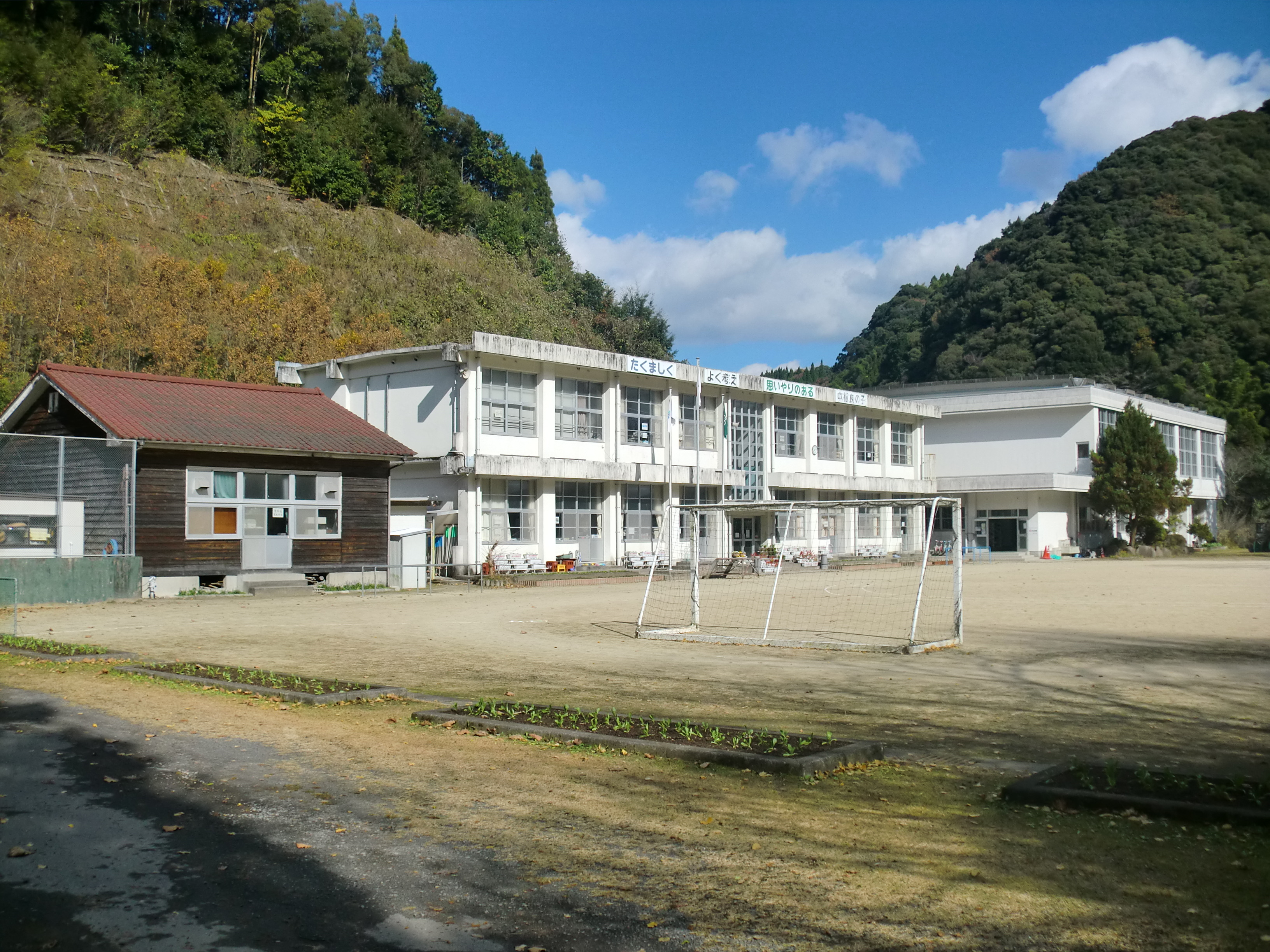 霧島市にある中福良（なかふくら）小学校